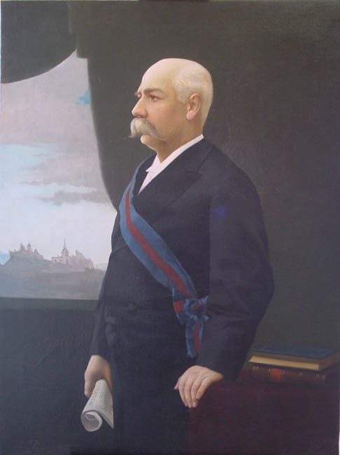 Benjamín Vicuña Mackenna (* Santiago, 25 de agosto de 1831 - † Santa Rosa de Colmo, 25 de enero de 1886) fue un destacado político e historiador chileno.